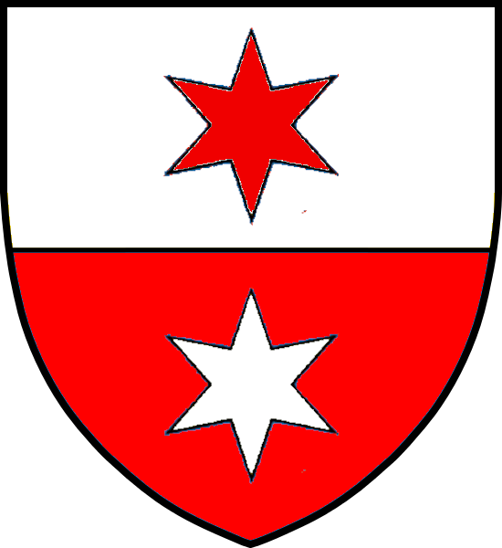 Vapensköld för danska adelsätten Qvitzow